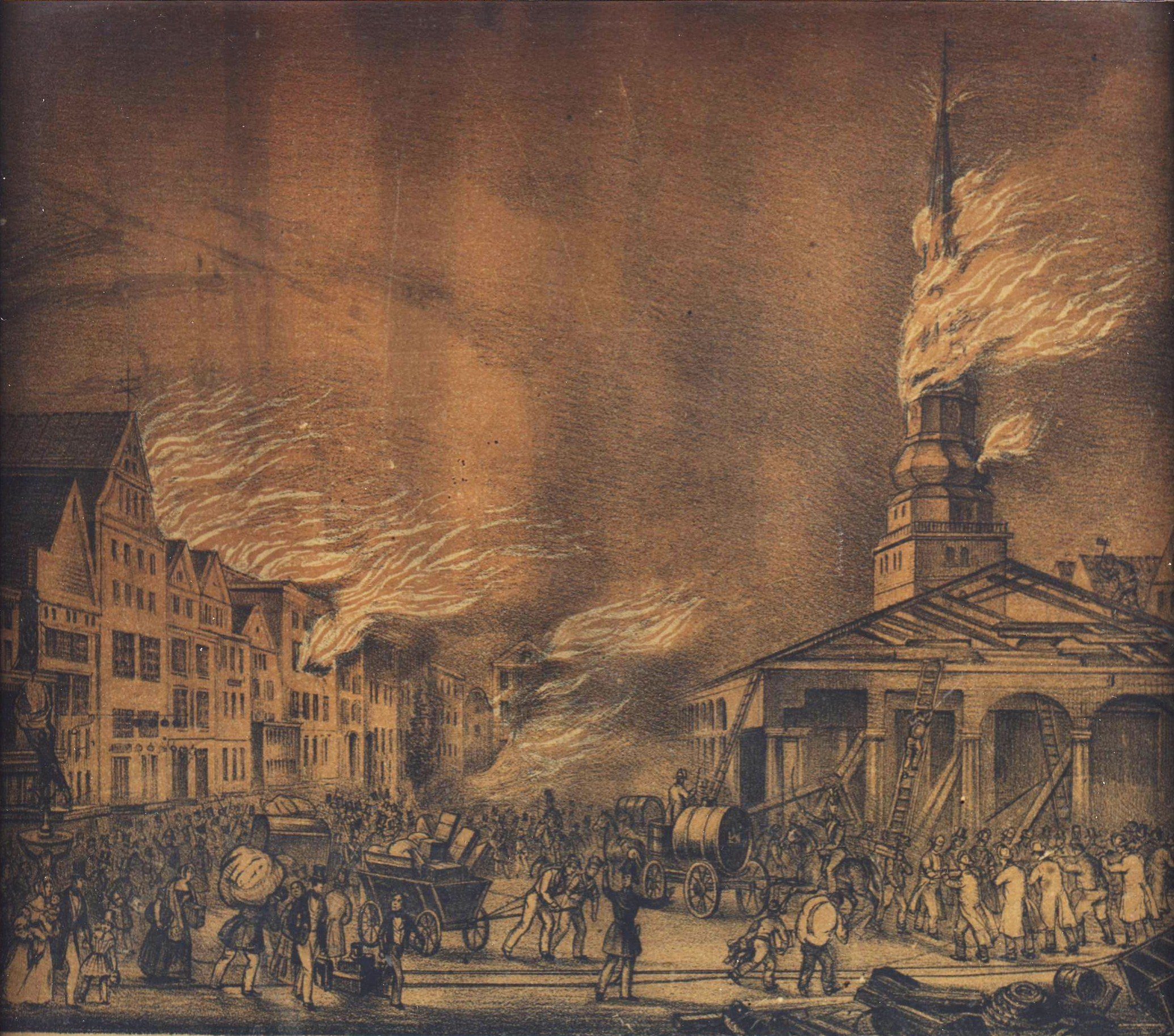 Hopfenmarkt und St. Nikolai im großen Hamburger Brand; This is a photograph of an architectural monument.